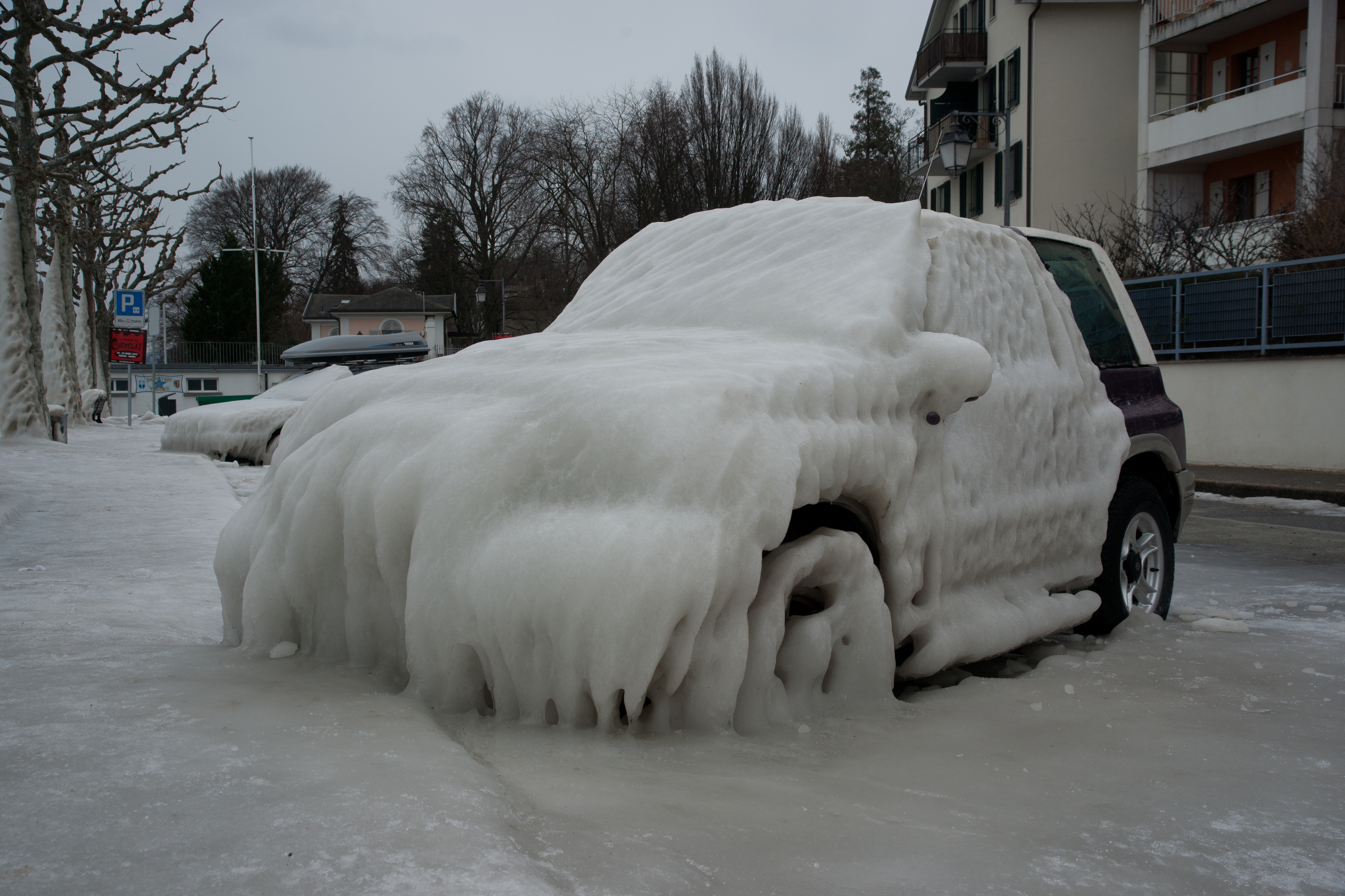 Voiture glacée à Versoix